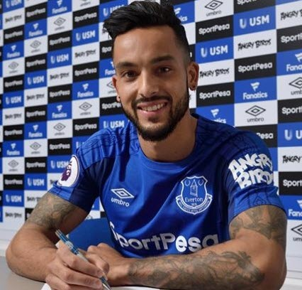 تئو در لباس اورتون